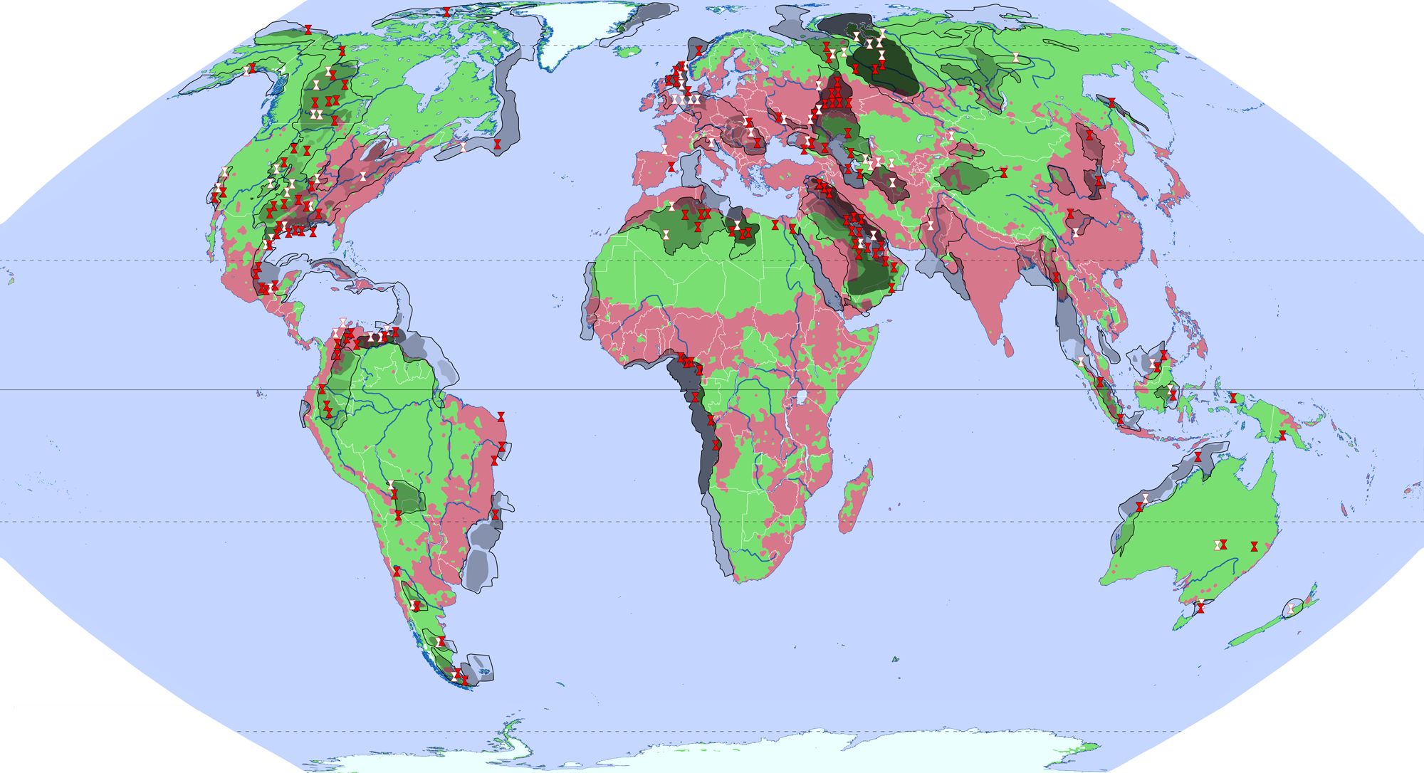 Bekannte konventionelle Erdöl- und Erdgasfelder, sowie Förderung Anfang des 21. Jahrhunderts Legende als Bild wg. Problemen mit Unicode-Zeichen